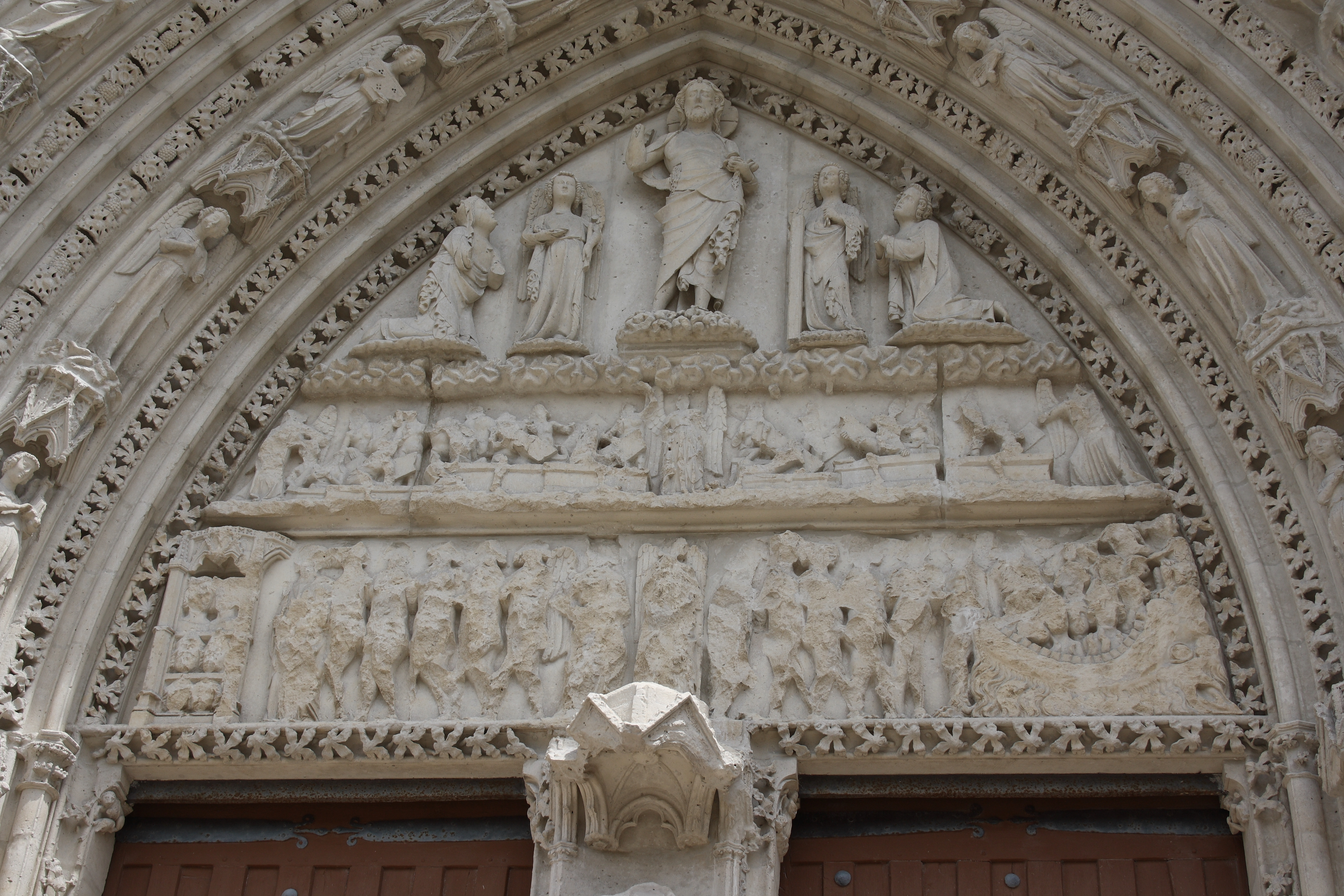 Katholische Kirche Saint-Sulpice-de-Favières in Saint-Sulpice-de-Favières im Département Essonne (Île-de-France), Tympanon des Mittelportals, Darstellung: das Jüngste Gericht; oben: der auferstandene Christus umgeben von zwei Engeln, Maria und Johannes; in der Mitte: die Auferstehung der Toten; unten: die Verdammten und die Auserwählten